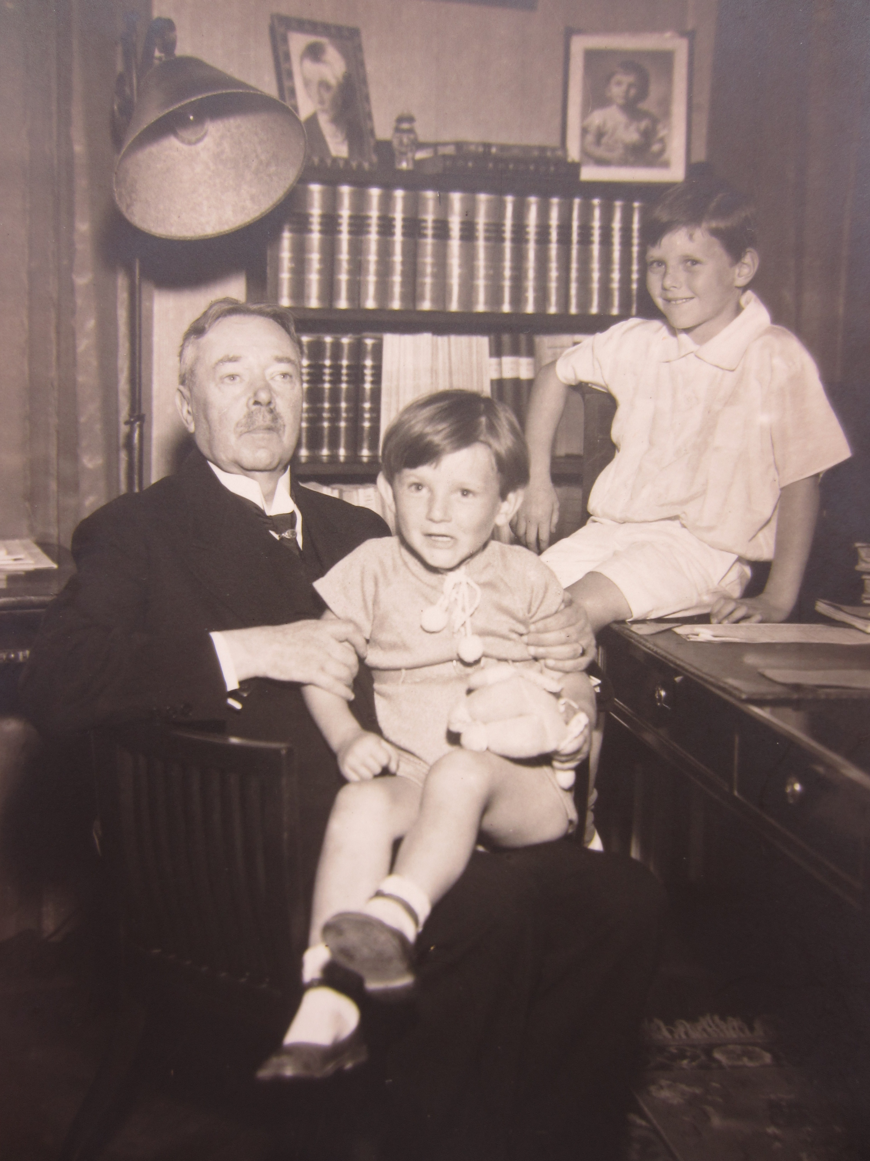 Hjalmar Söderberg med barnbarnen Staffan (1931–91) och Rolf (1926–2015 på besök, Glahns Allé 43 i Köpenhamns förstad Frederiksberg, 1934.